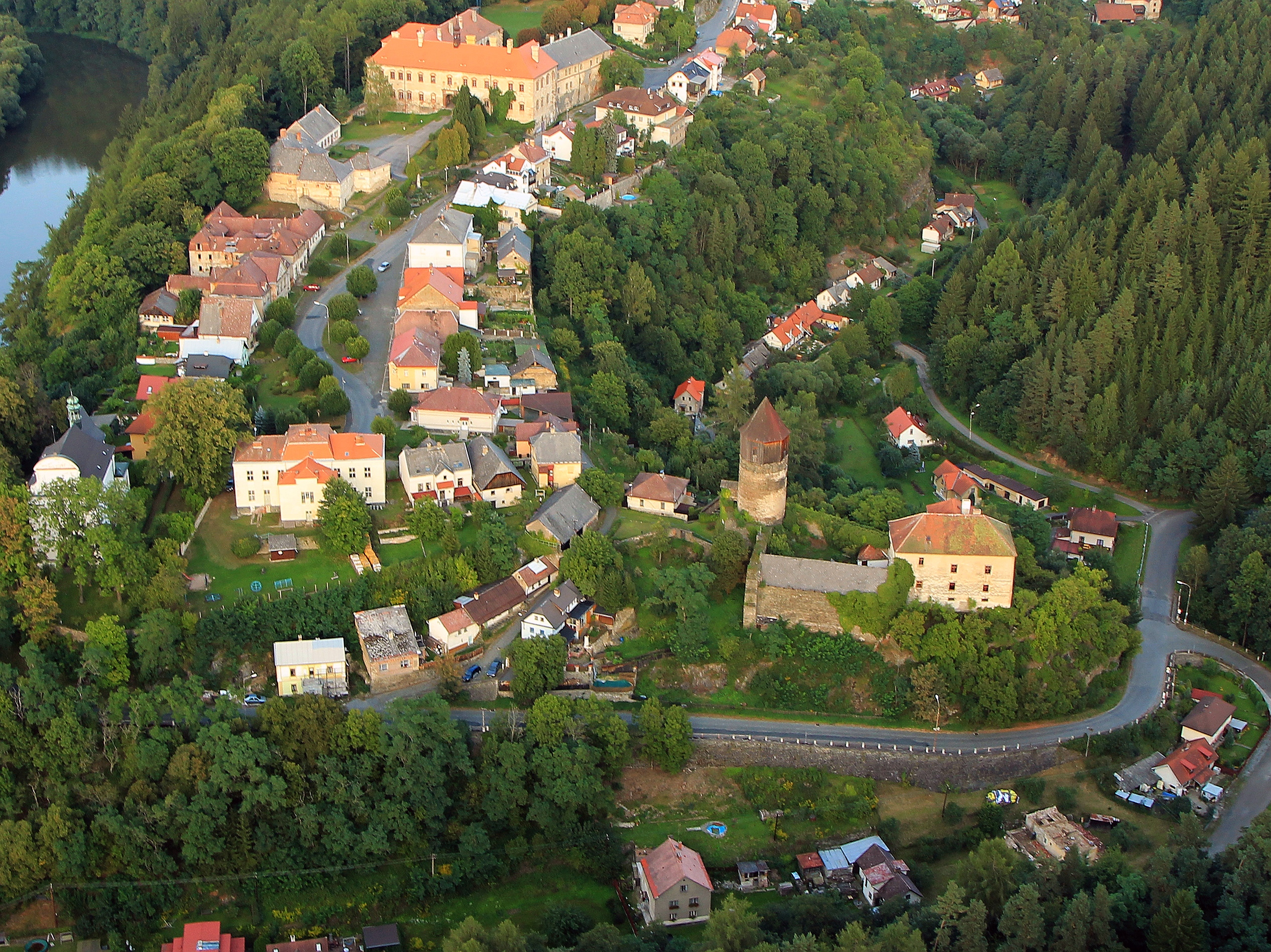 Rataje nad Sázavou -letecký pohled